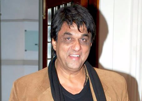 Mukesh Khanna at Roshan Taneja's Birthday Bash